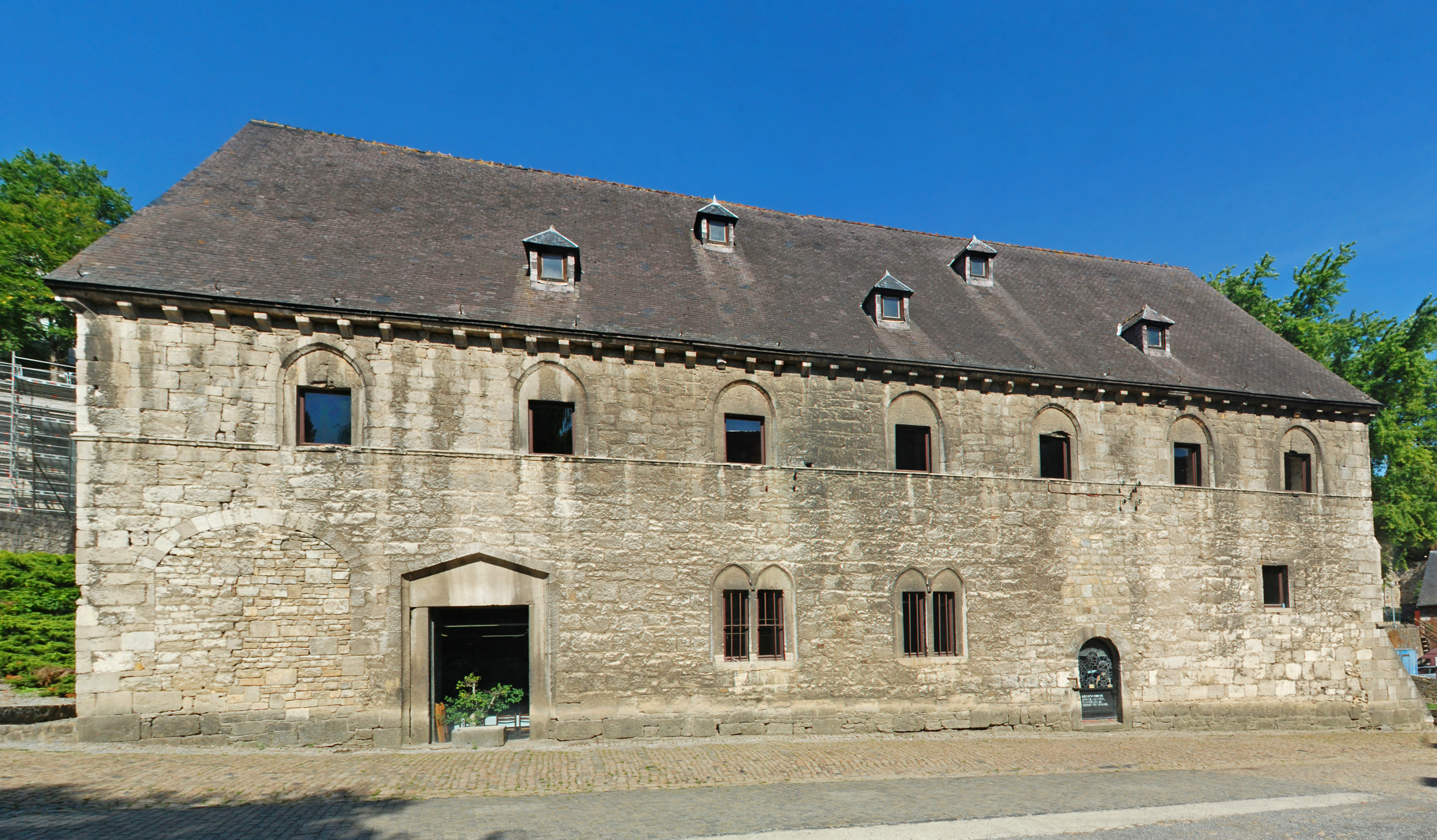 Belgique - Province de Namur - Abbaye de Floreffe - Moulin-brasserie